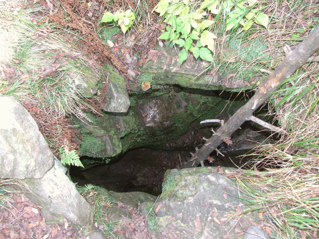 Zbójnicka Jama (jaskinia) (Gorce)